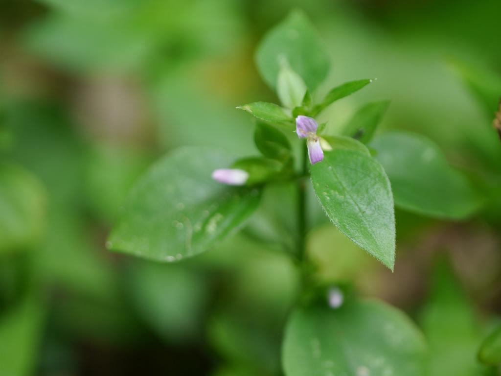 Dicliptera chinensis：ヤンバルハグロソウ 2015/08/27 沖縄本島：Okinawa Island, Japan